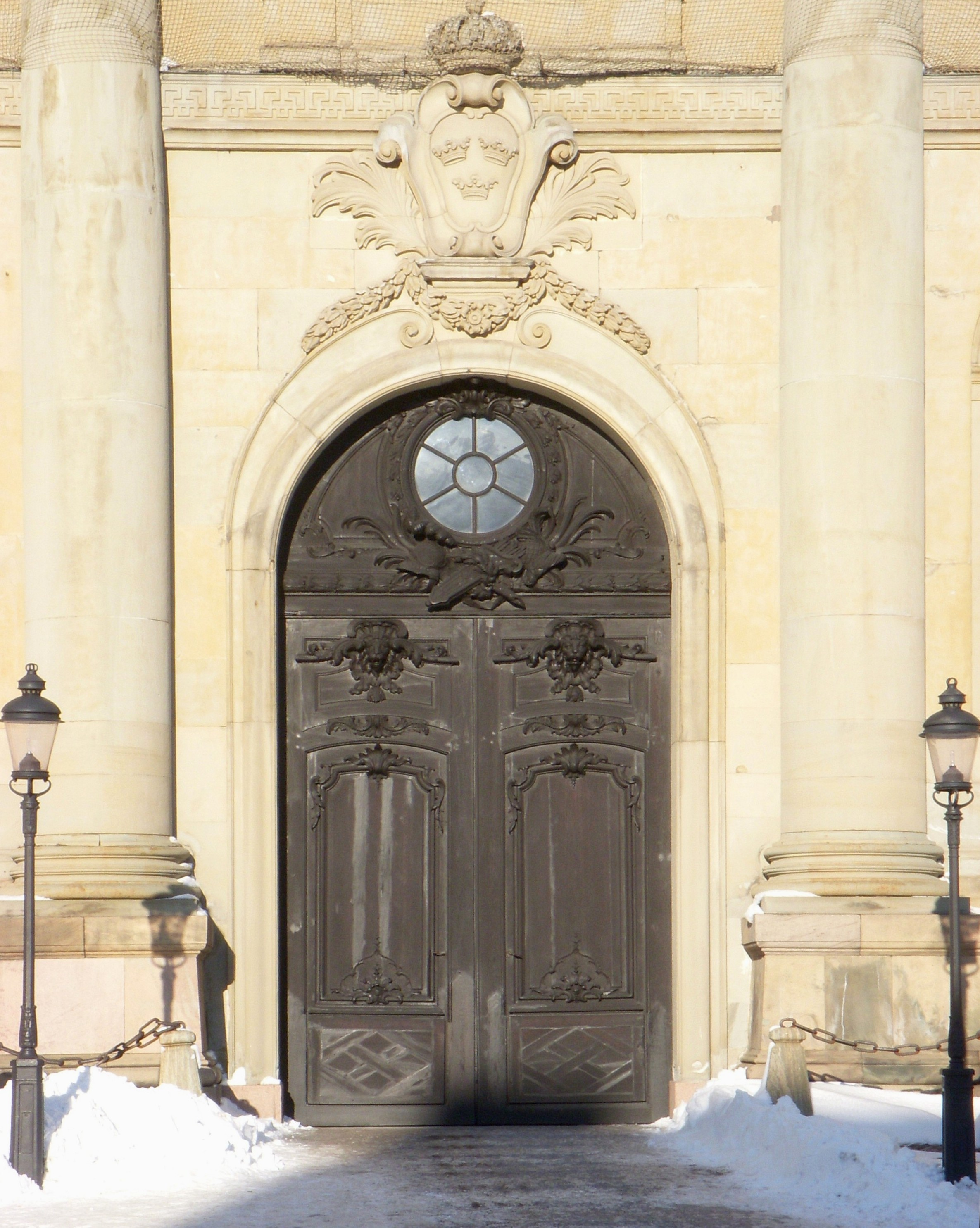 Stockholms slott porten till södra valvet